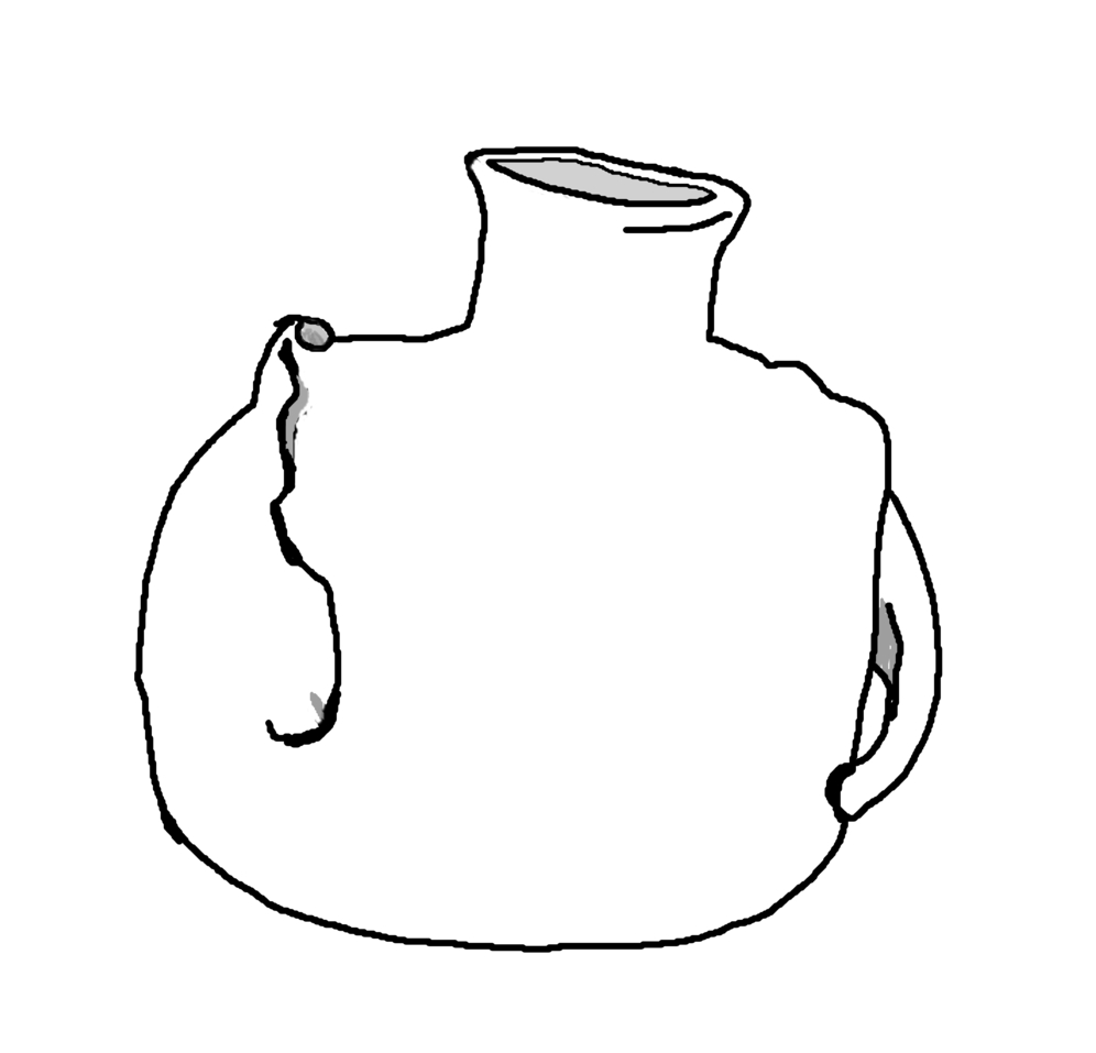 烏孫文物，陶繭燭形壺。